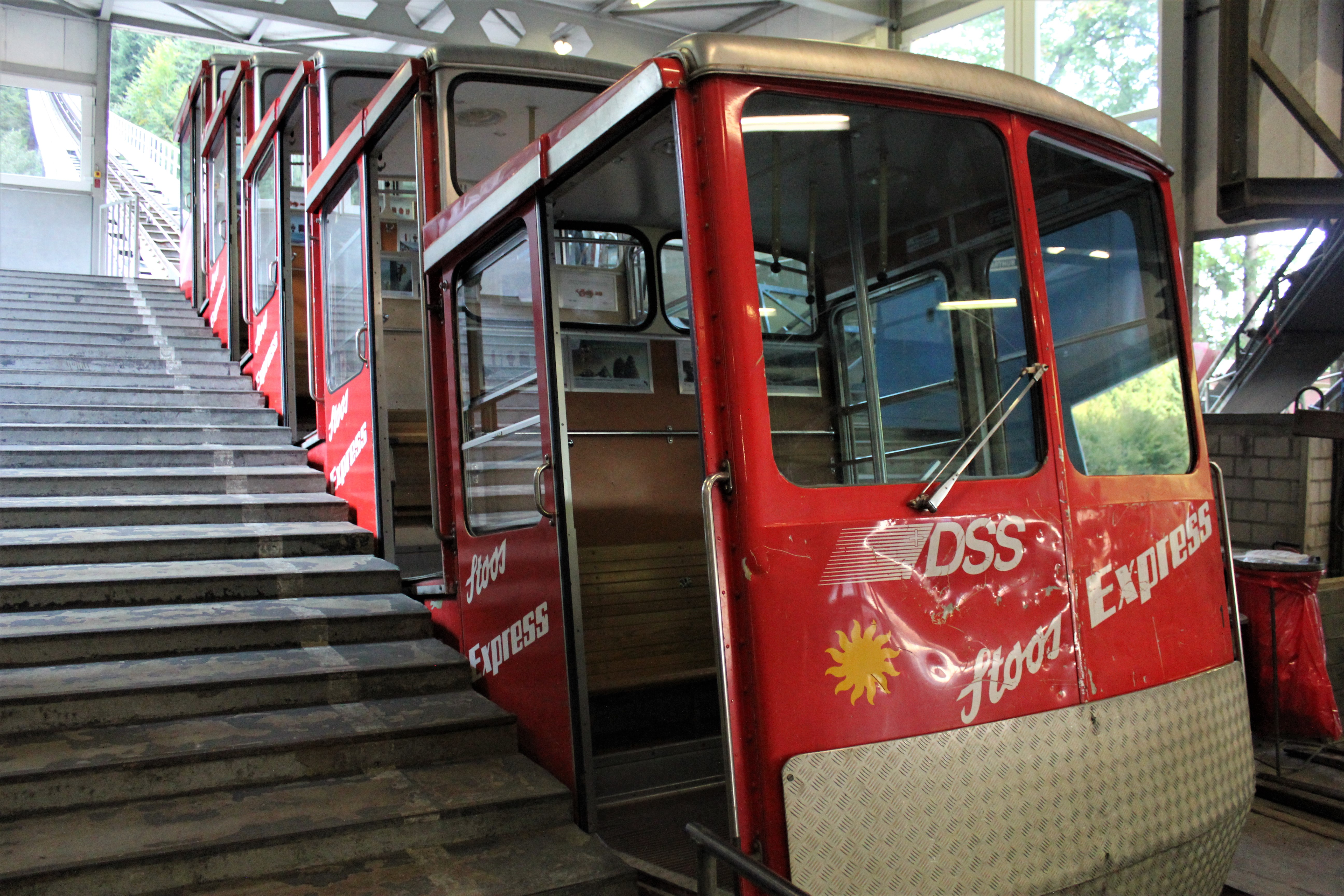 Eines von zwei Fahrzeugen der Drahtseilbahn Schwyz–Stoos im letzten Betriebsjahr 2017 vor der Ablösung durch eine neue Bergbahn.